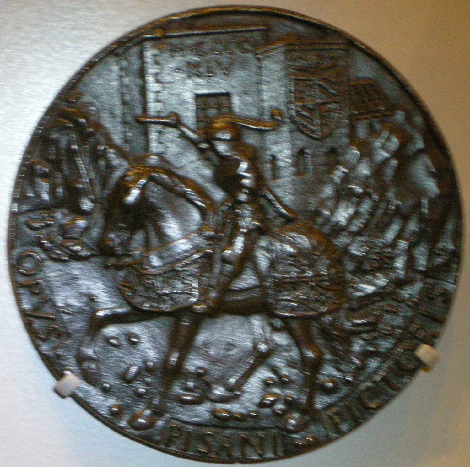 Pisanello, seconda medaglia di sigismondo pandolfo malatesta, retro, 1445